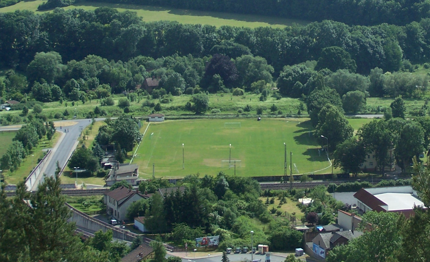 Der Viadukt und der westlich angrenzende Sportplatz am Rothenhof in der Eisenacher Oststadt.